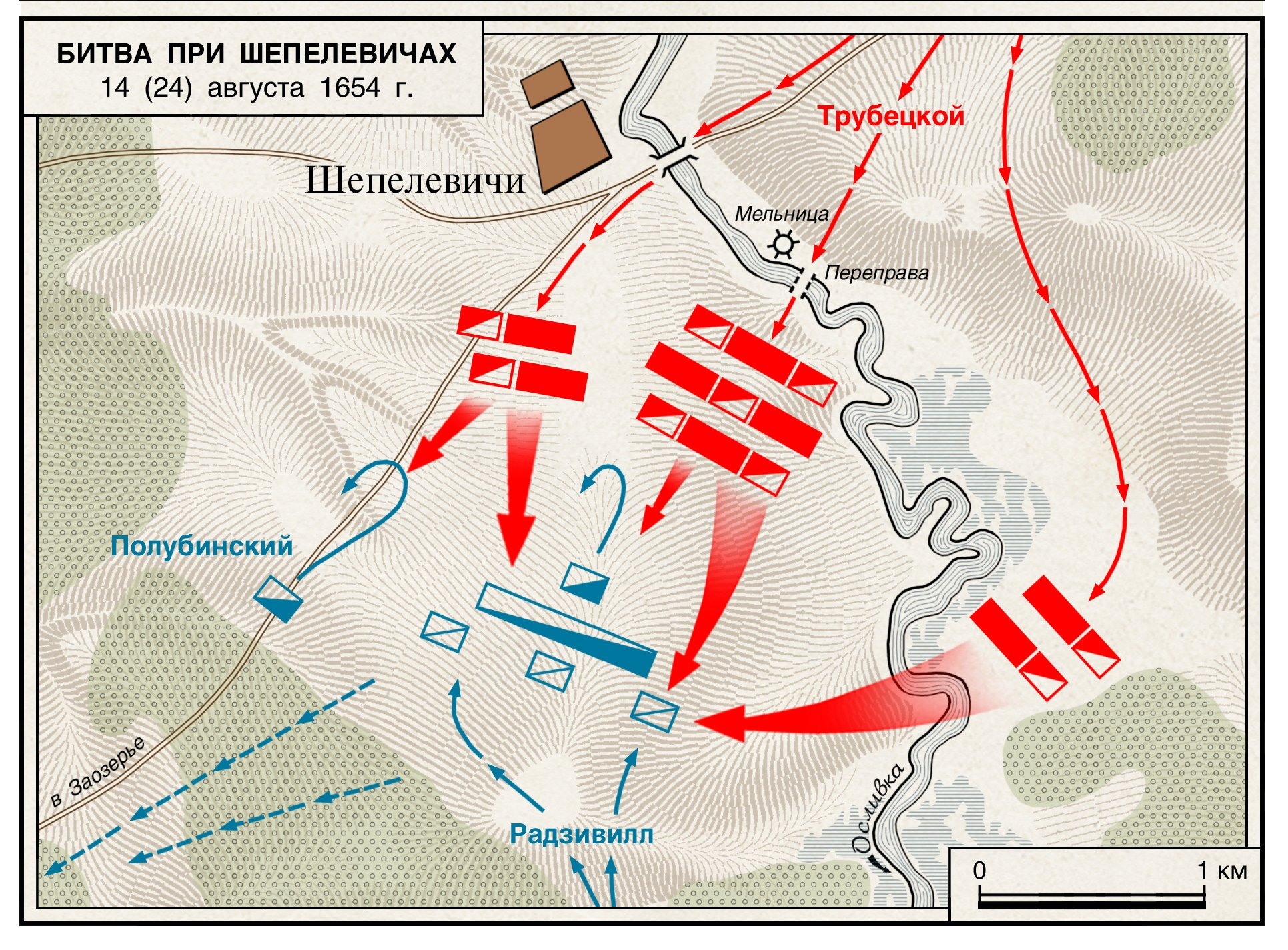 Схема сражения у села Шепелевичи 14 (24) августа 1654 года в ходе русско-польской войны 1654-67 гг. Схема опубликована в монографии И.Б. Бабулина Смоленский поход и битва при Шепелевичах 1654 года. М.: Фонд «Ратное дело», 2018. Автор схемы Ю. Юров. Схема размещена с согласия И.Б. Бабулина